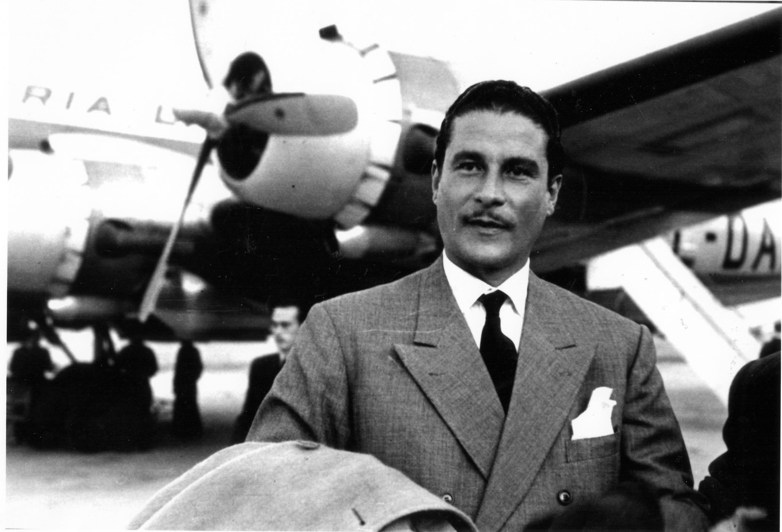 Errol Flynn posando junto al avión después de aterrizar.